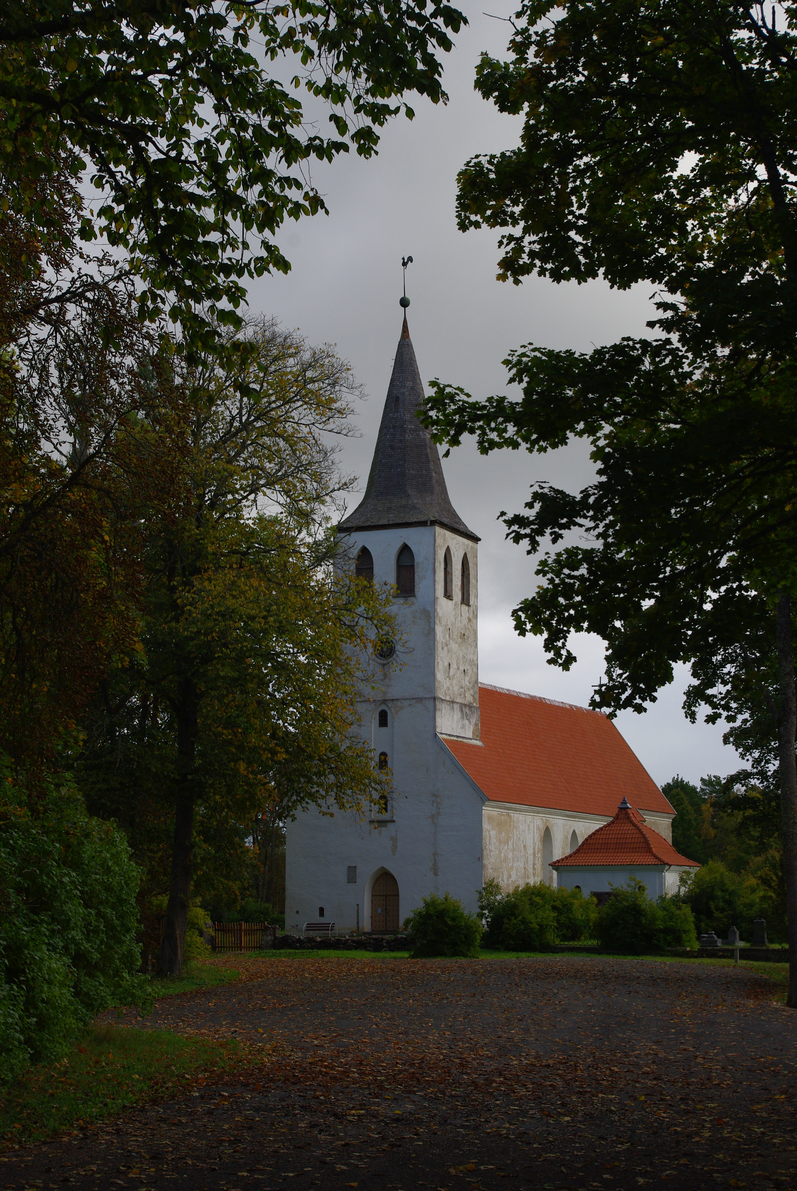 Pühalepa kirik